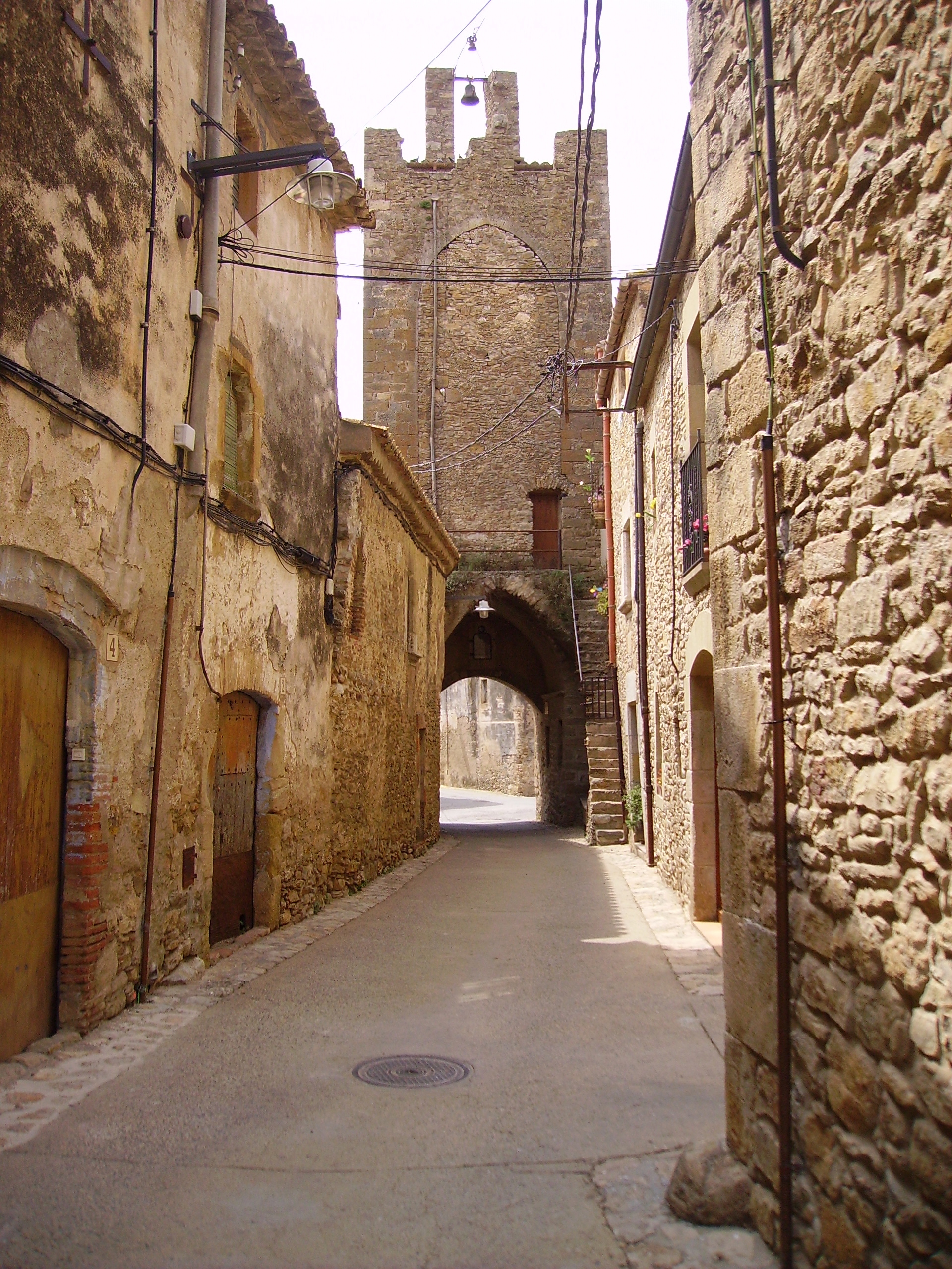 Carrer de Palau-sator al Baix Empordà, Catalunya. Al fons, la torre-portal de les Hores.